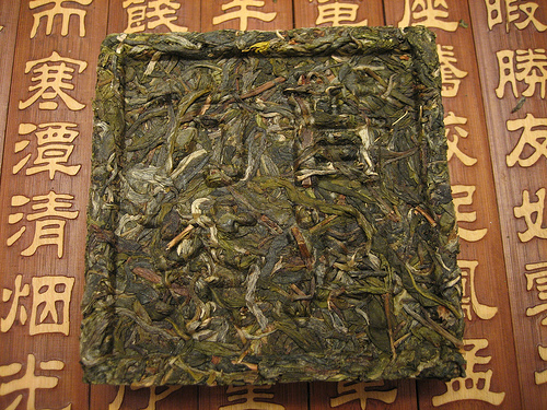 Fang cha, Dadugang 2006 raw pu-erh fangcha.